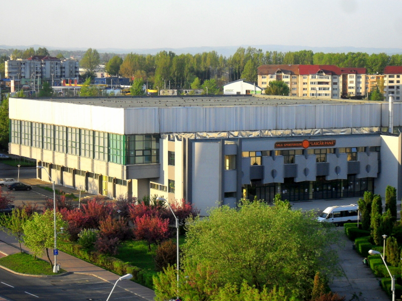 Baia Mare